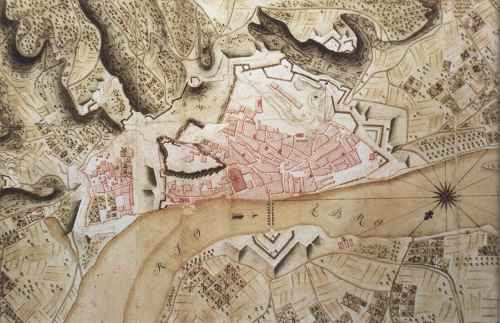 Mapa militar de Tortosa, el 1642